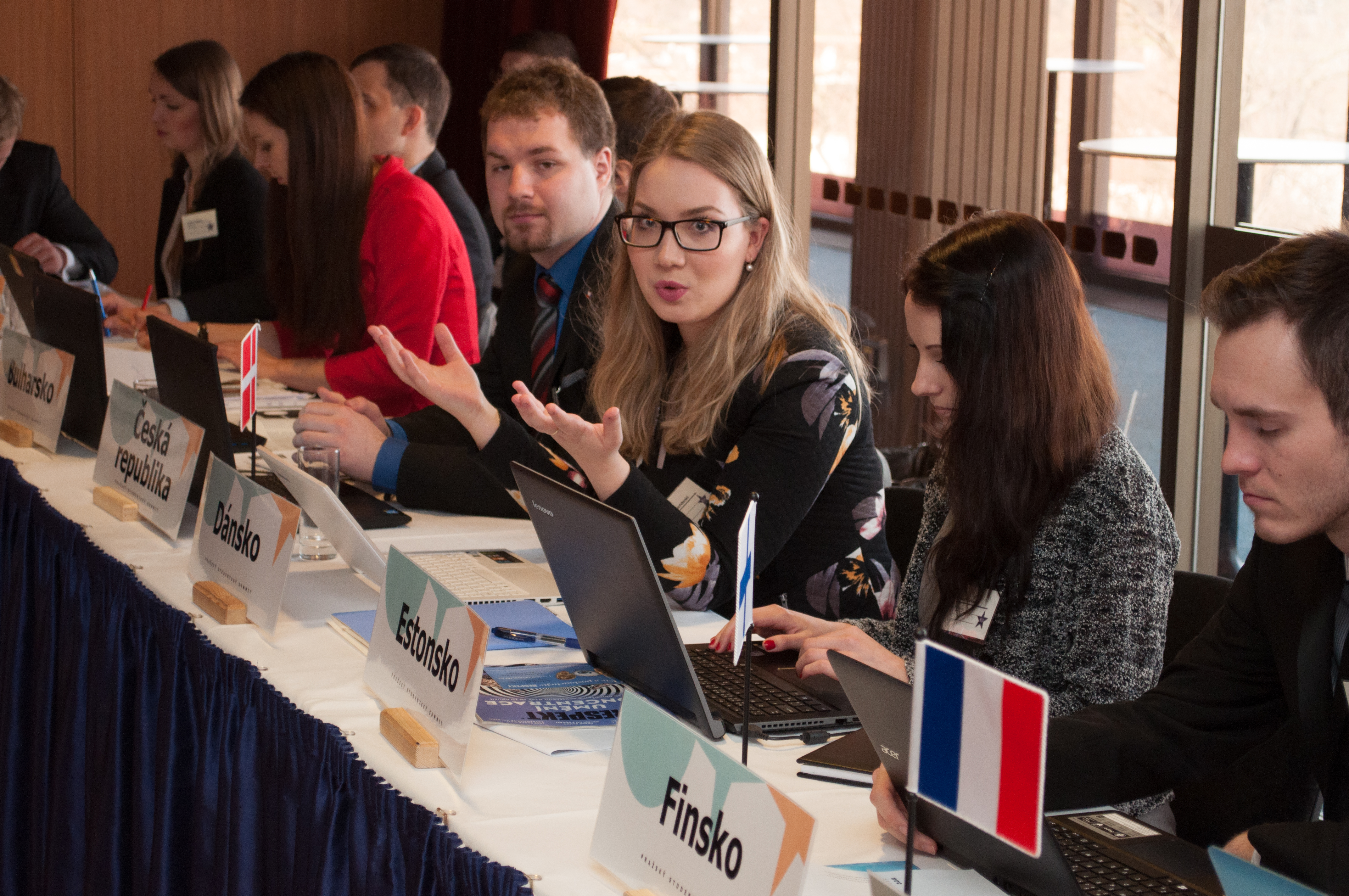 delegati